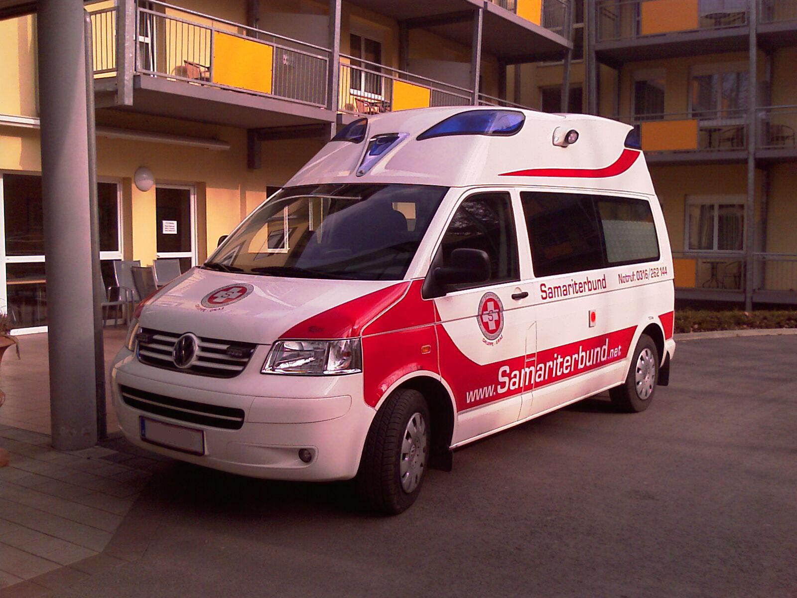 Rettungsauto des ASBÖ-Graz vom Typ VW-T5